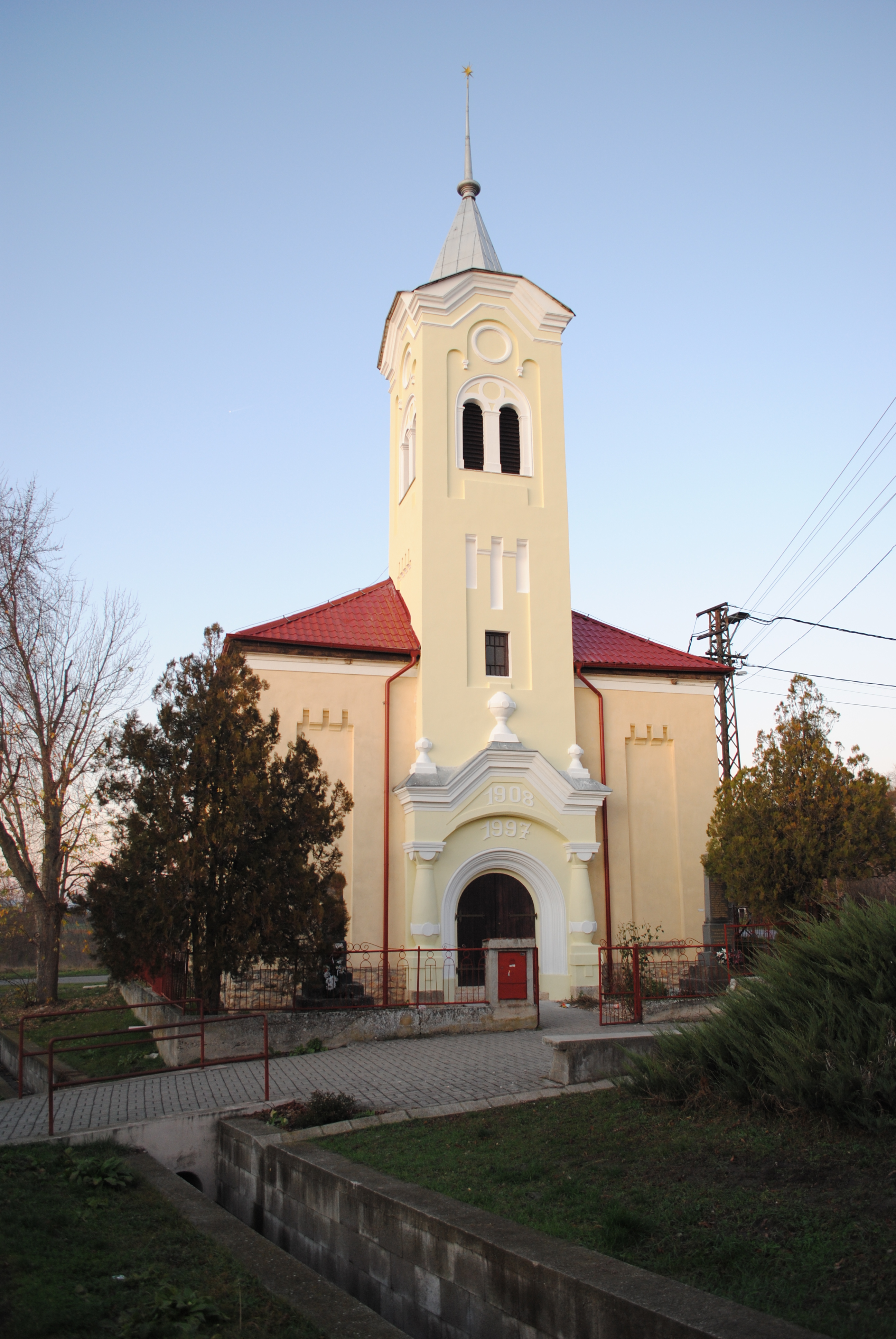 Nagypeszeki ref. templom, 2019.11.30.